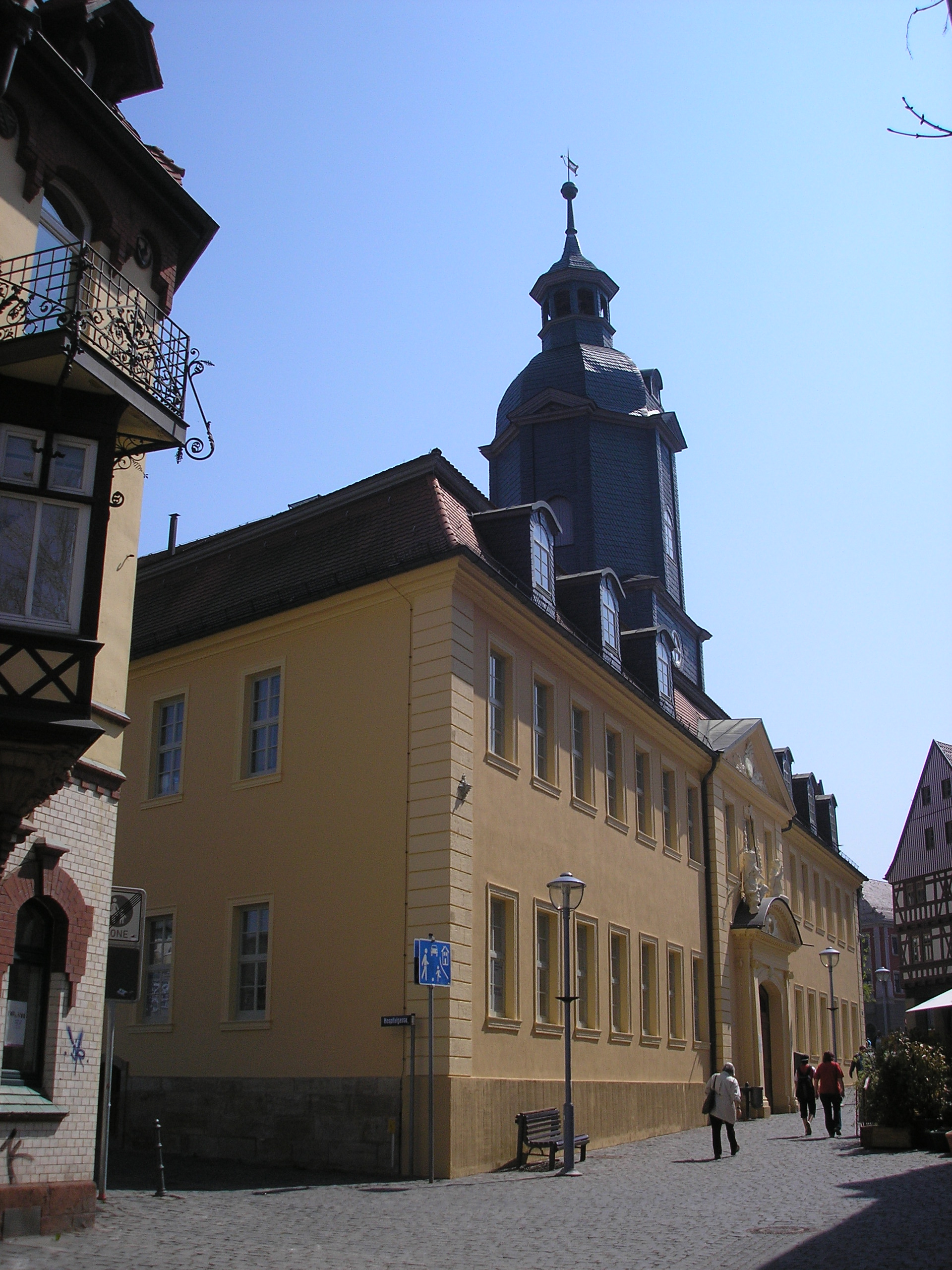 Das Maria-Magdalenen-Hospital in Gotha (Thüringen).